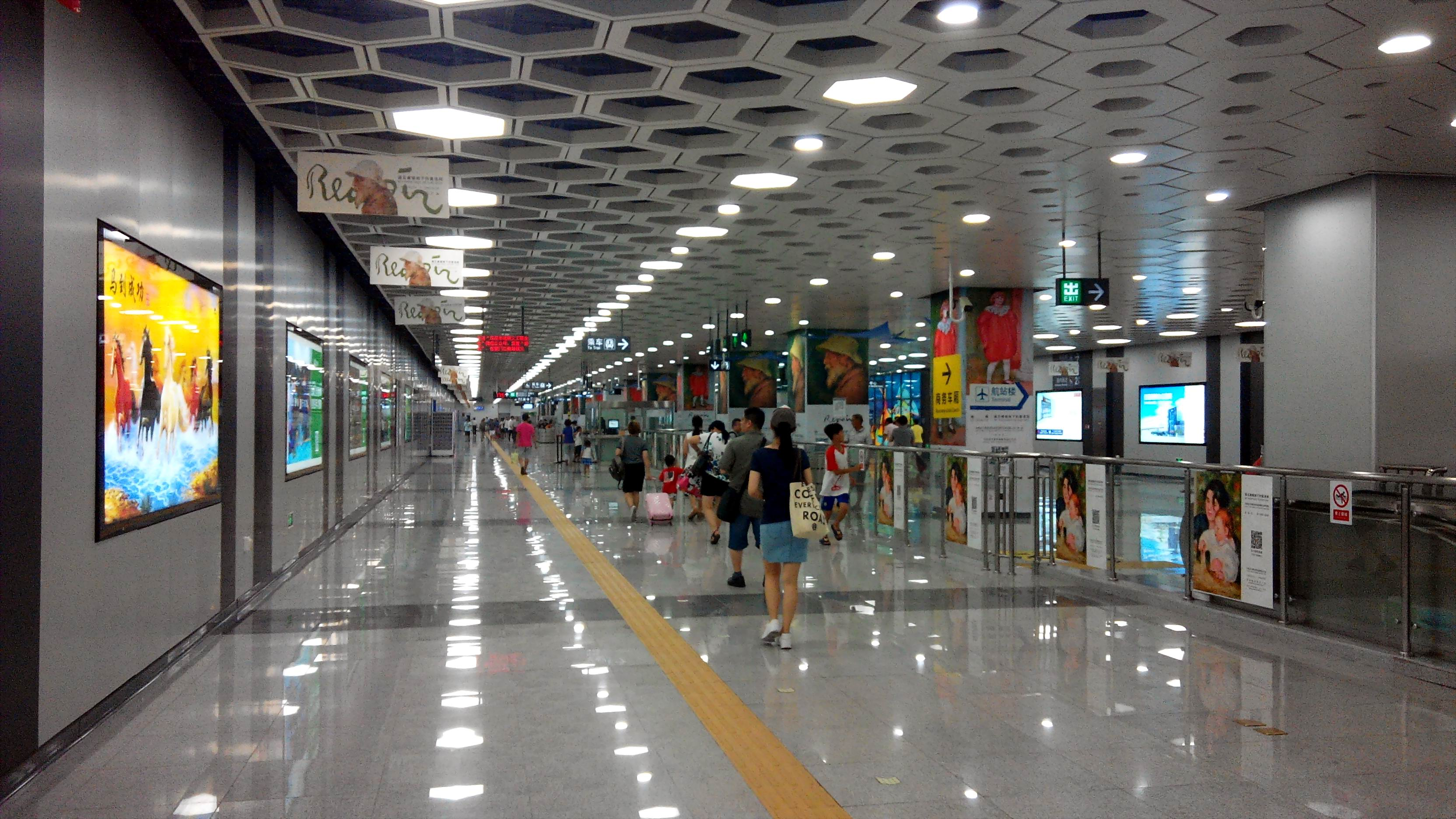 深圳地铁11号线 机场站 大堂